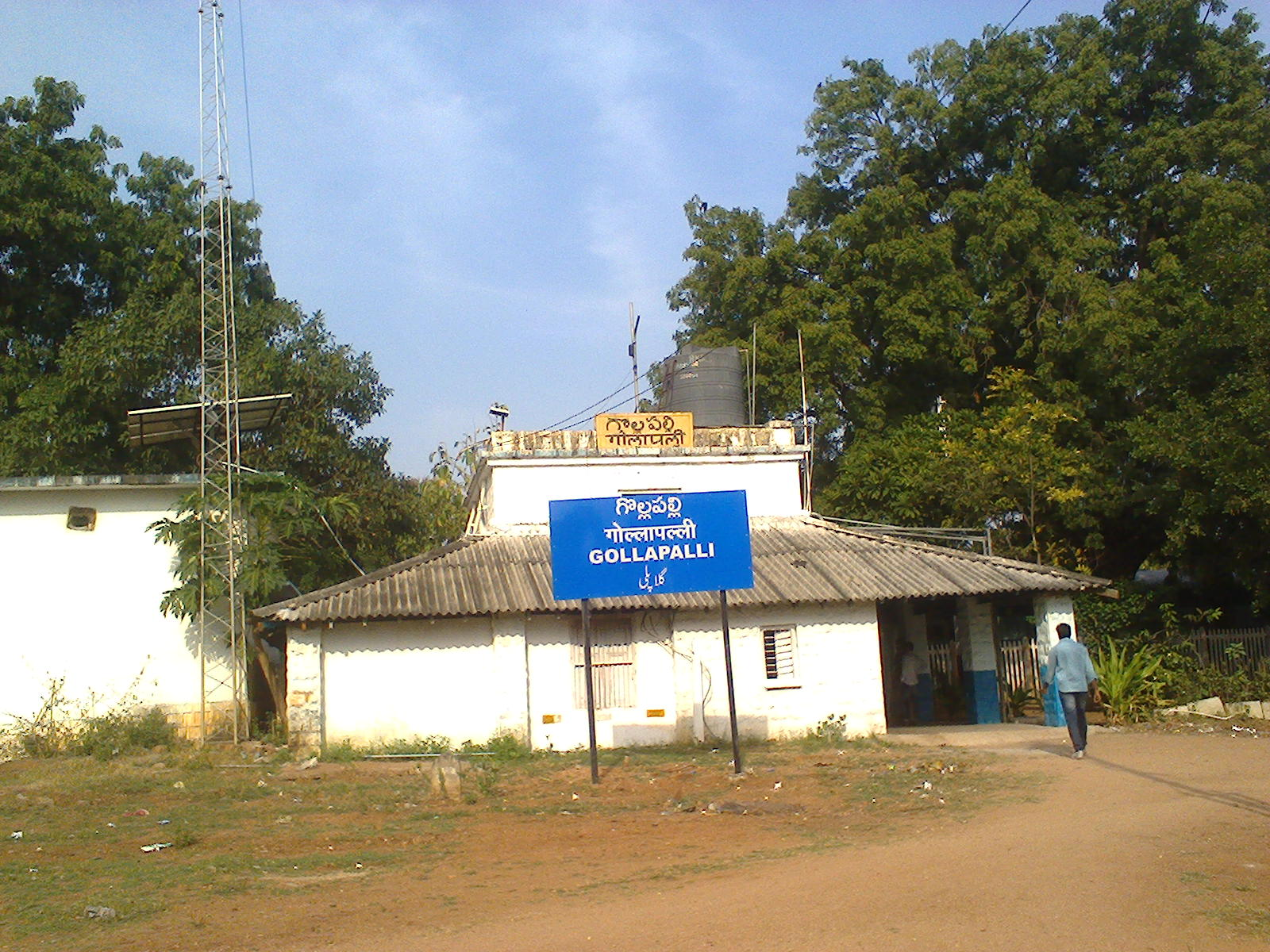 గొల్లపల్లి రైల్వేస్టేషన్